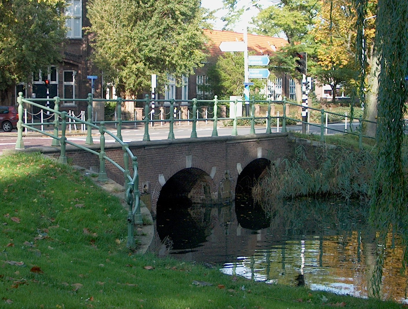 Veliusbrug, Hoorn, Nederland.